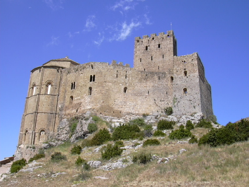 Vista del Castillo de Loarre. Este castillo románico, amurallado con torreones, está en la sierra de Loarre, en la provincia de Huesca (España) (a unos 35 kilómetros de la capital provincial). Fue construido en el siglo XI por orden del rey Sancho III de Navarra sobre un promontorio de roca caliza. Está considerado como la fortaleza románica mejor conservada de Europa.